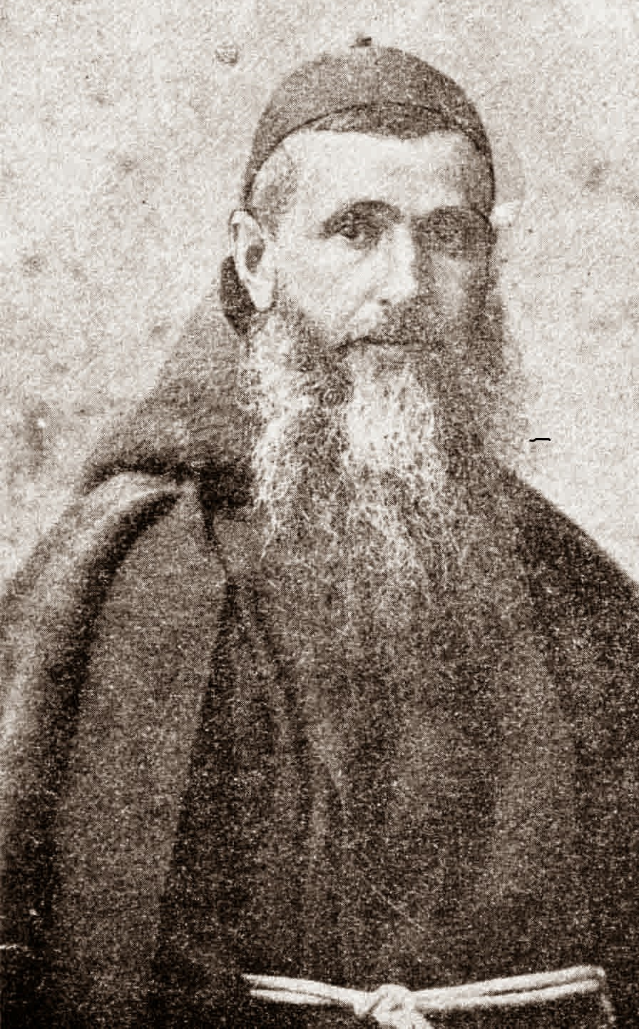 Padre Bonaventura da Calangianus.